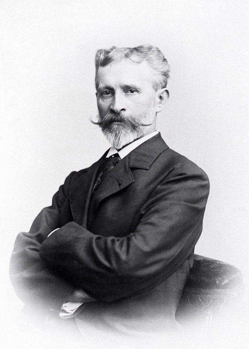 Лоренц, Фёдор Карлович